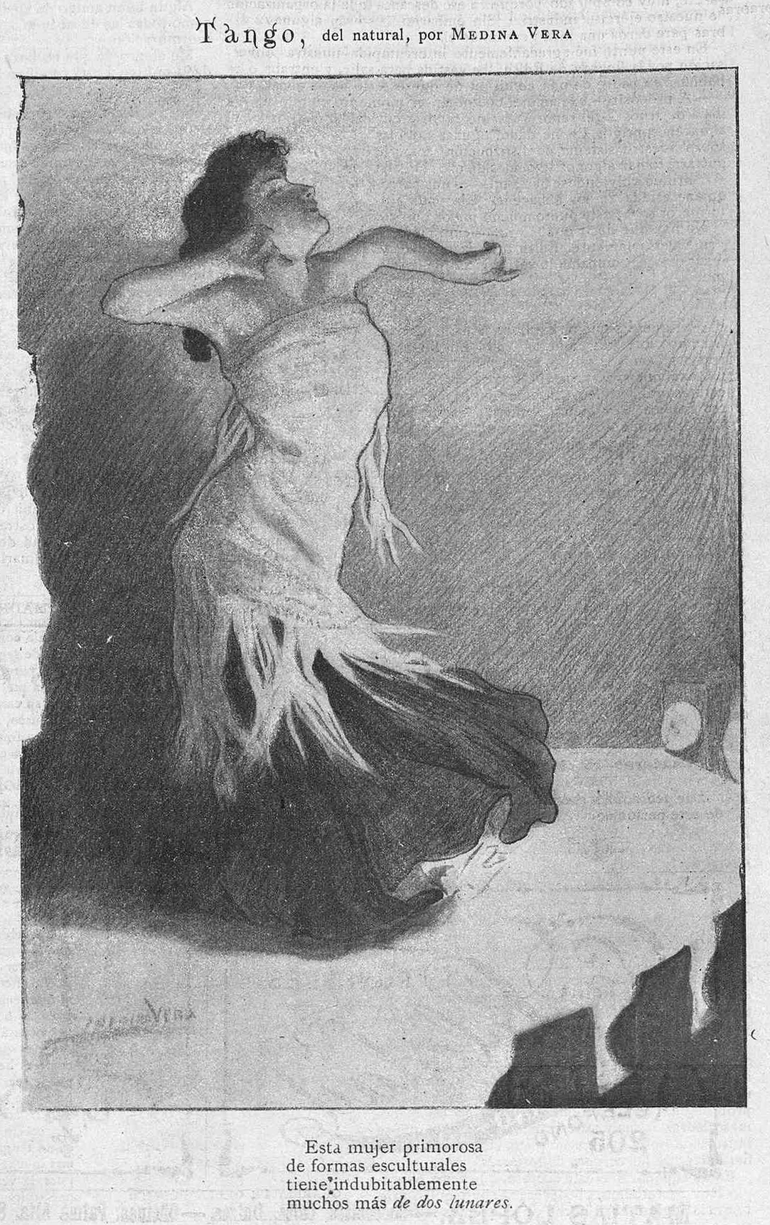 Tango.